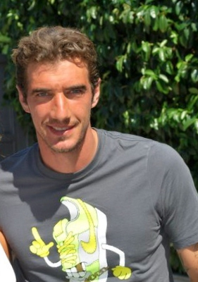 Paolo Castellini a Bogliasco